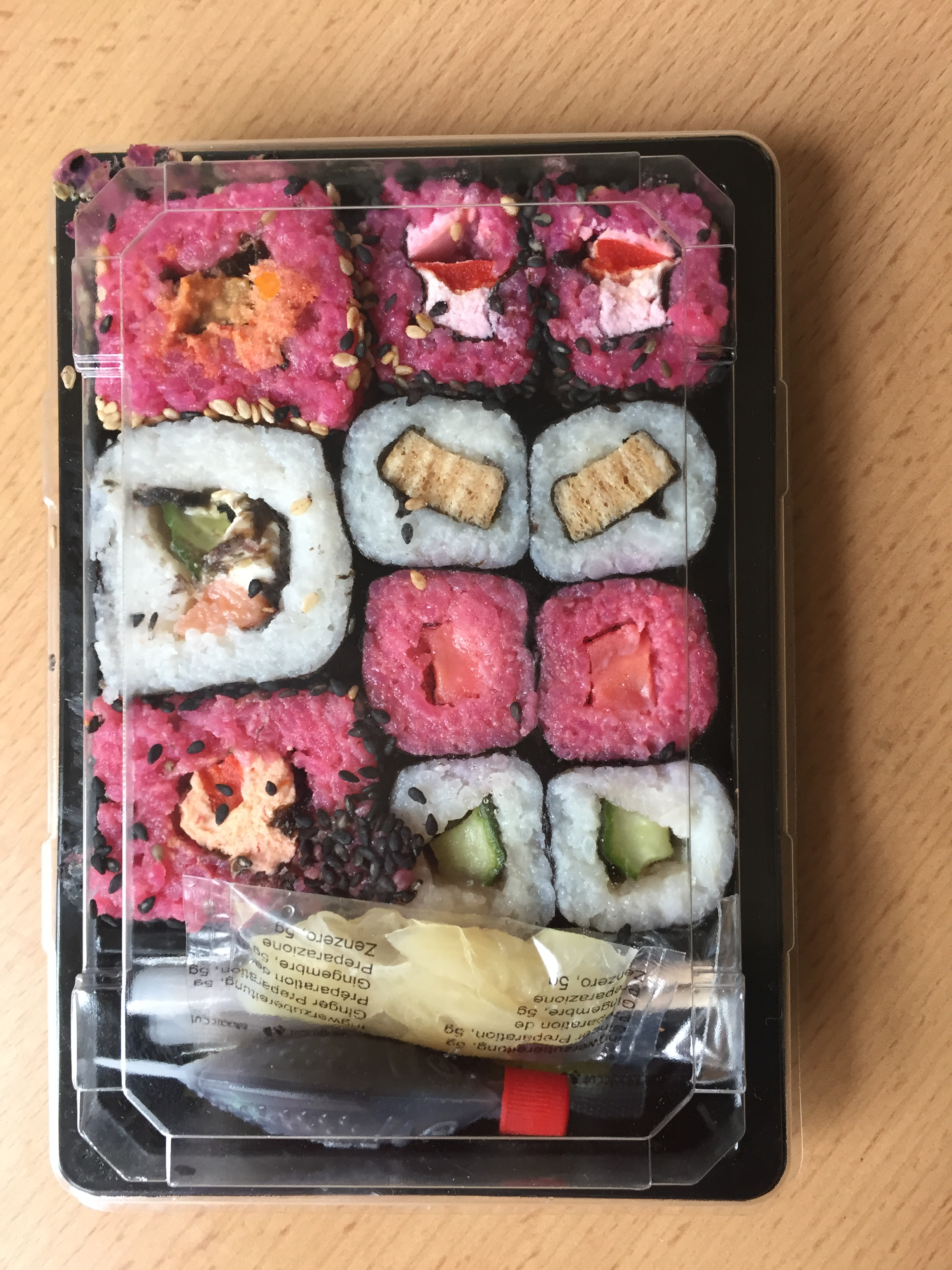 Sushi-Box, wie sie in Supermärkten angeboten wird